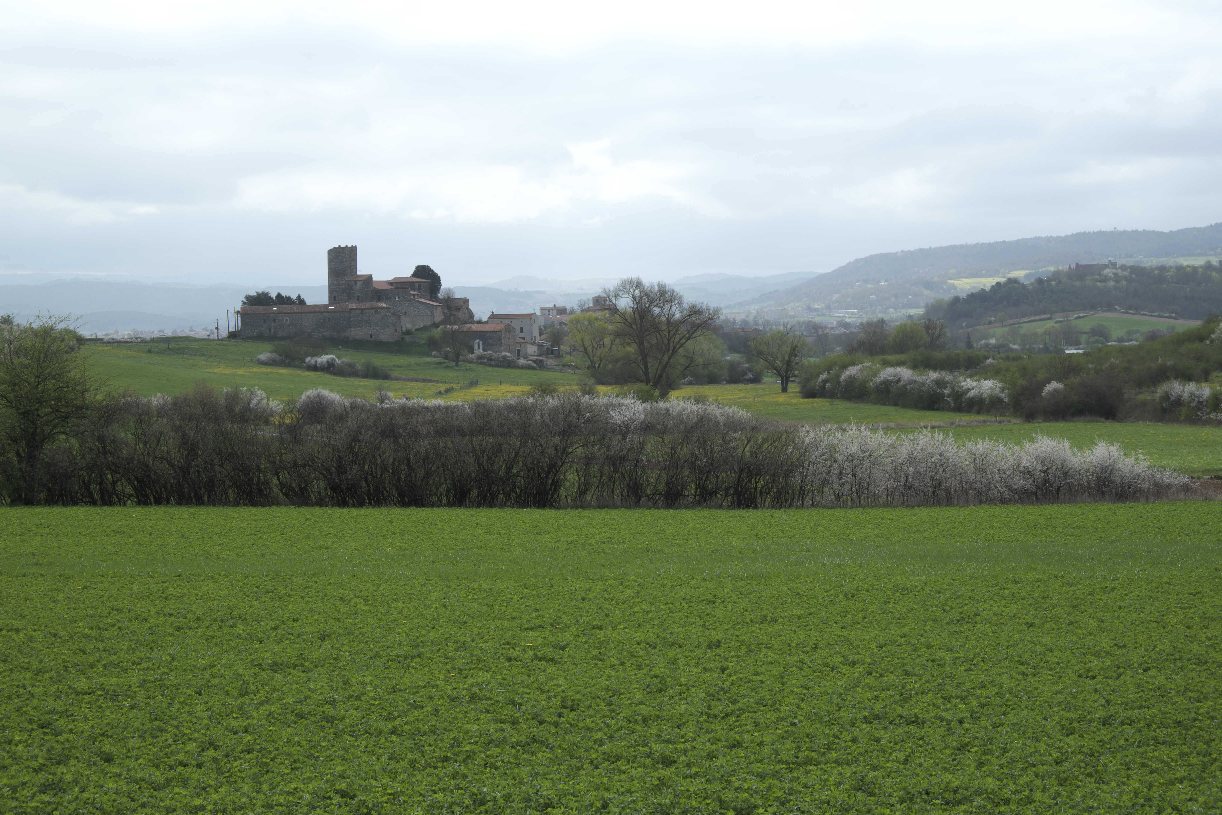 Château de Lauriat (Schloss Lauriat) in Beaumont im Département Haute-Loire (Auvergne-Rhône-Alpes/Frankreich)